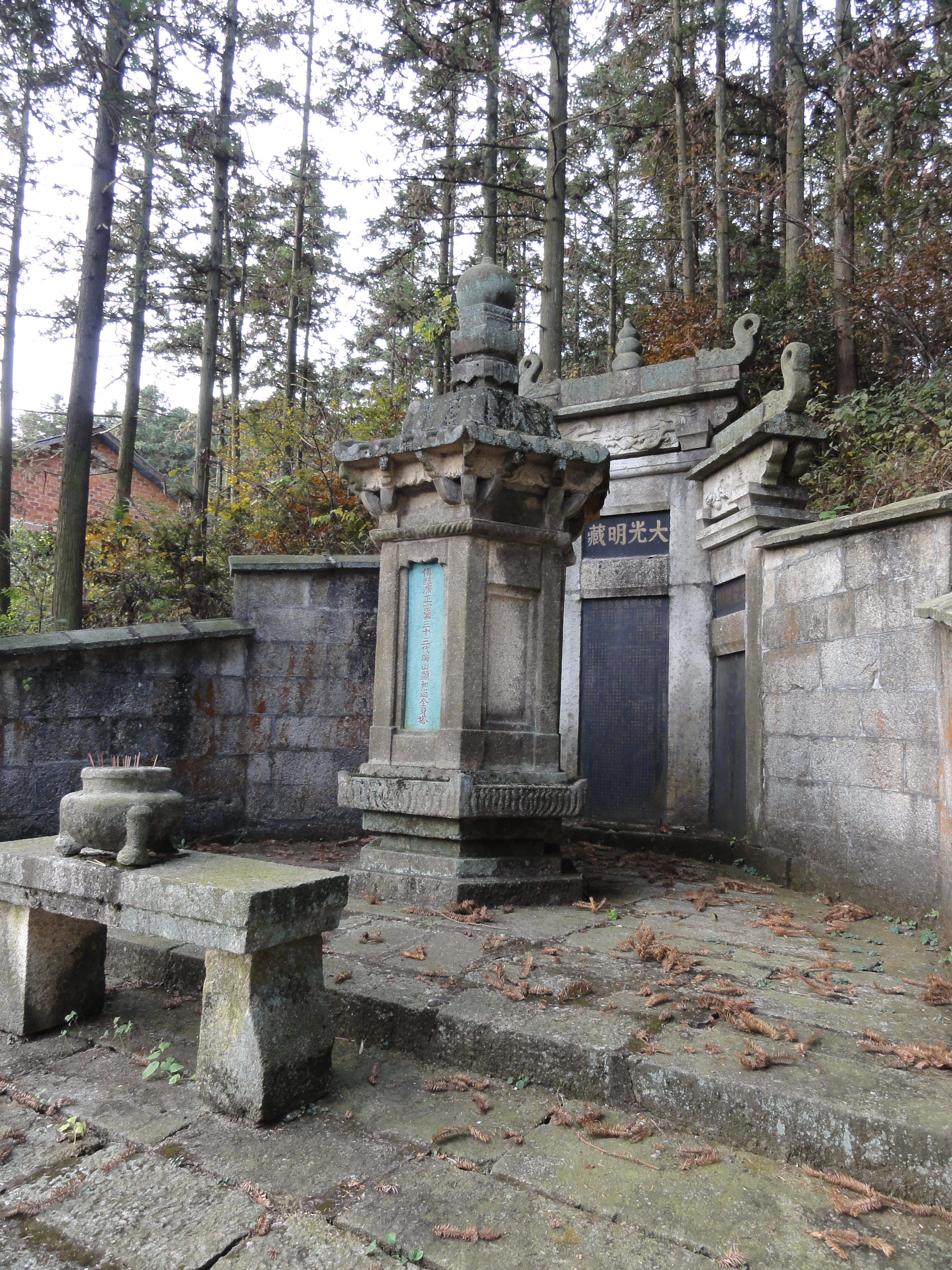 晦山戒顯禪師塔(塔全景側面圖)，座落於雲居山趙州關外東北側，1985年由真如禪寺常住重建。